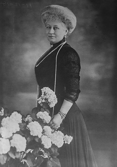 Princess Augusta Viktoria of Schleswig-Holstein (1858 - 1921)